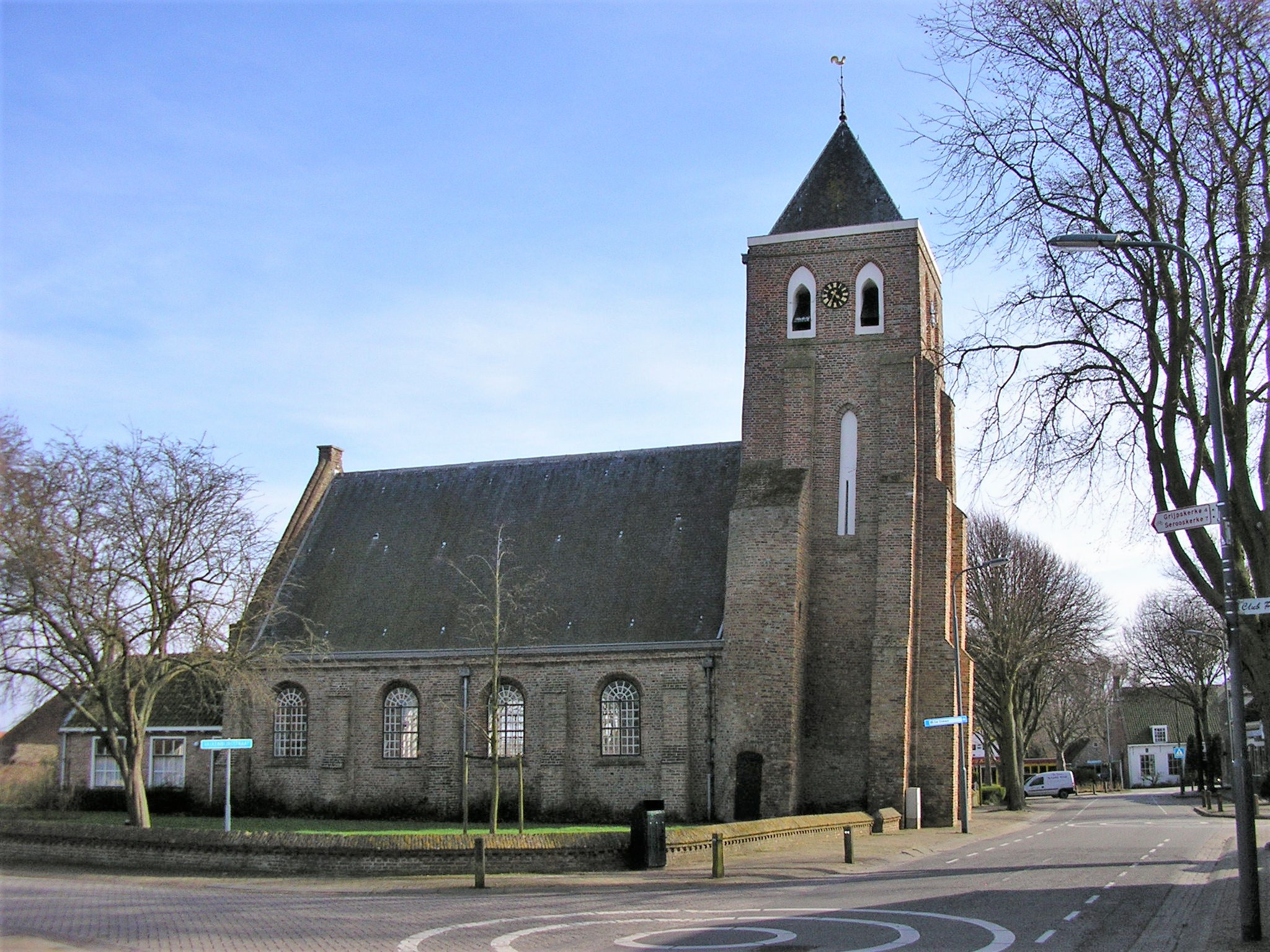 Meliskerke_Odulphuskerk